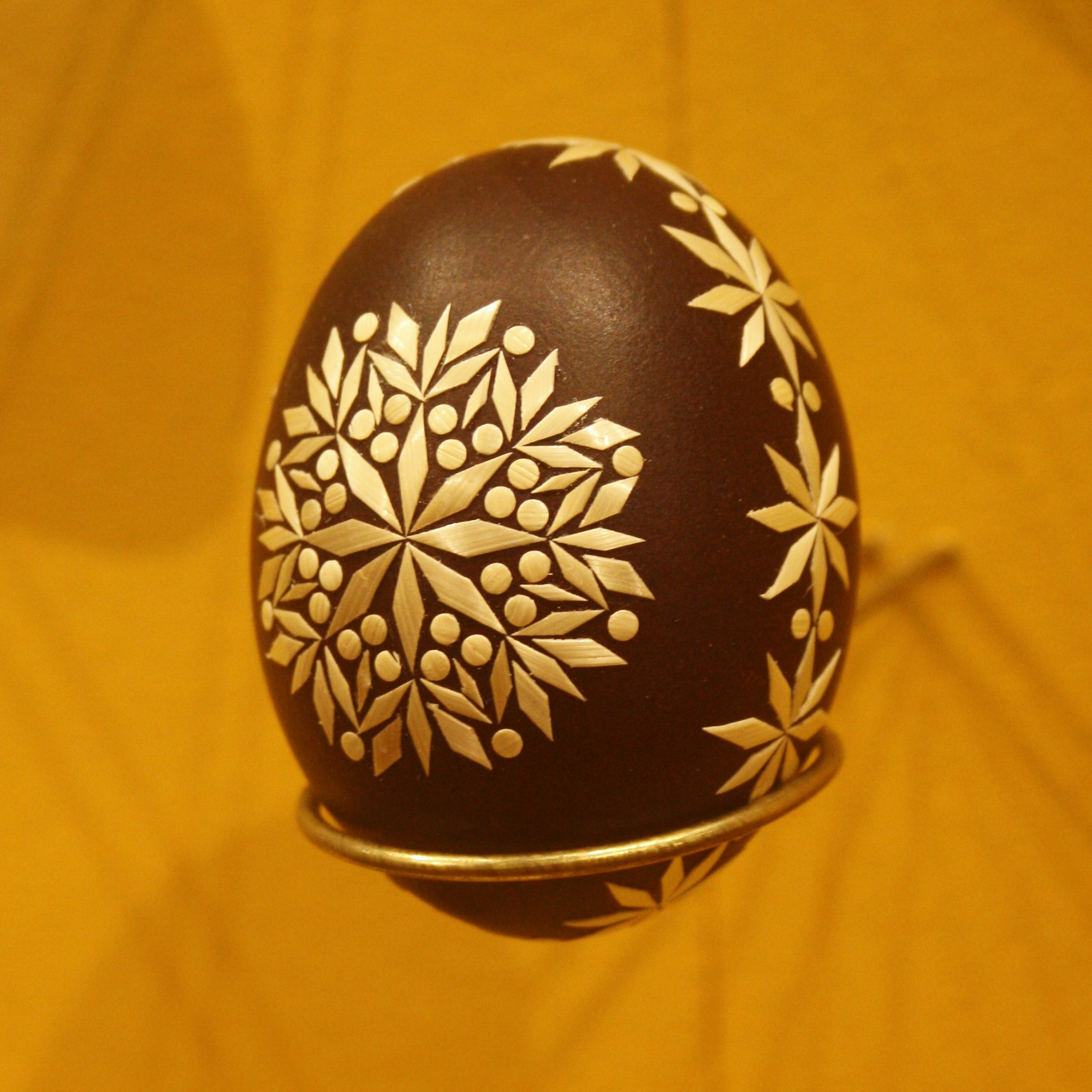 Národopisné muzeum - Musaion: kraslice zdobená polepováním slámou (Morava, Haná, polovina 20. století)